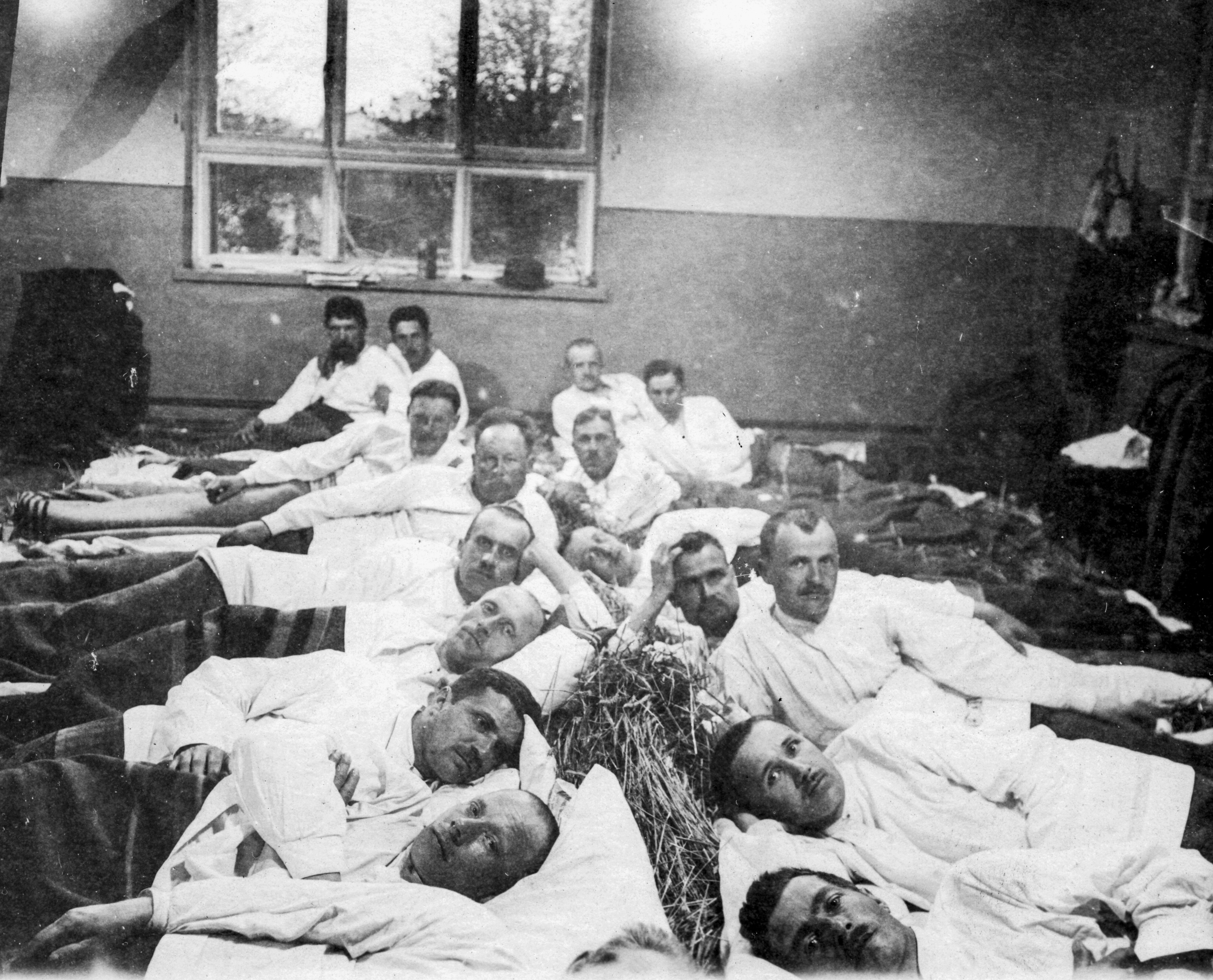 CC-BY Tampere 1918, kuvaaja tuntematon, Vapriikin kuva-arkisto. Finnish Civil War 1918, Photographer unknown, Vapriikki Photo Archives.